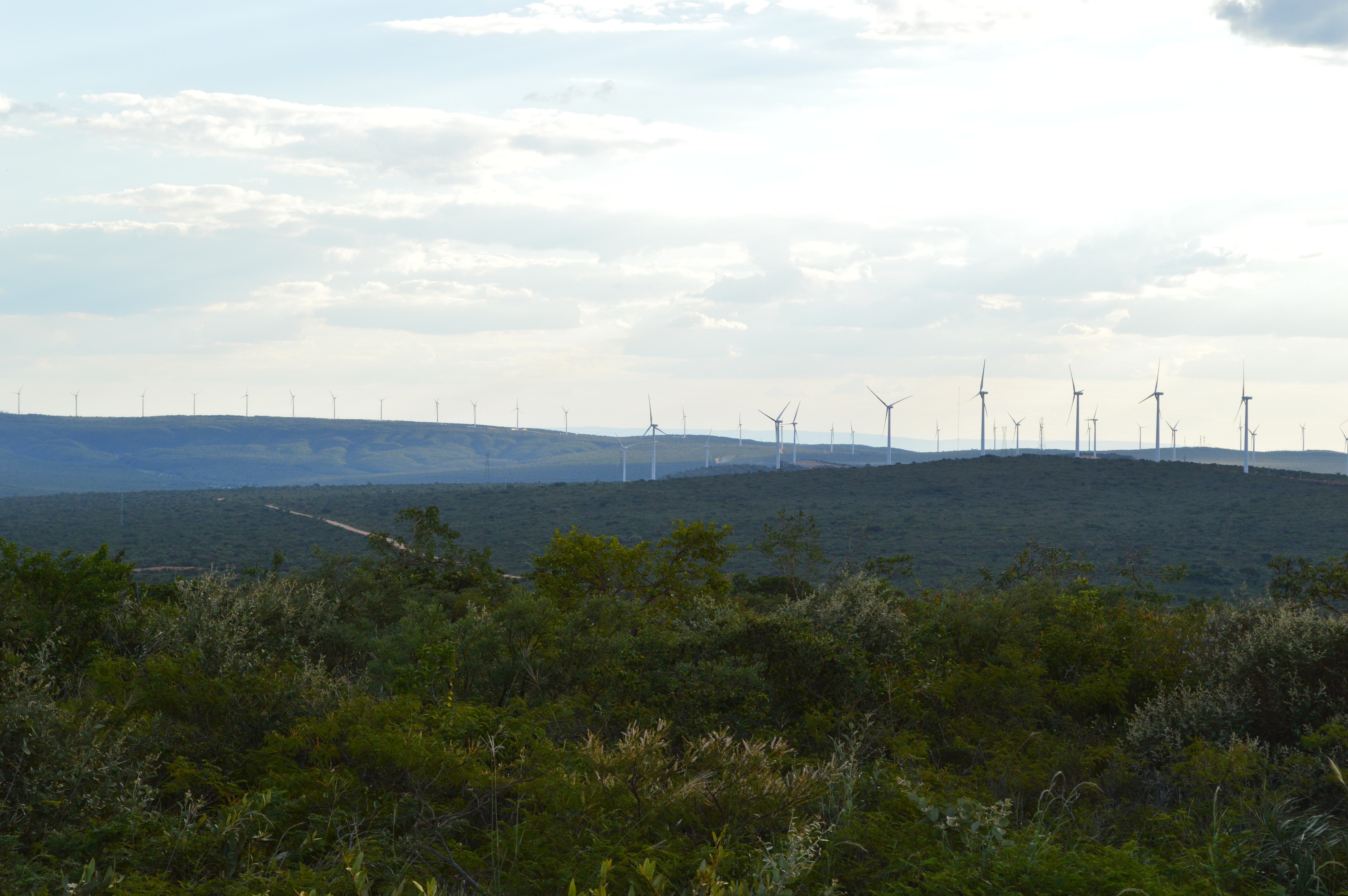 Vista panorâmica do Parque Eólico Alto Sertão, Caetité, Bahia, 2016